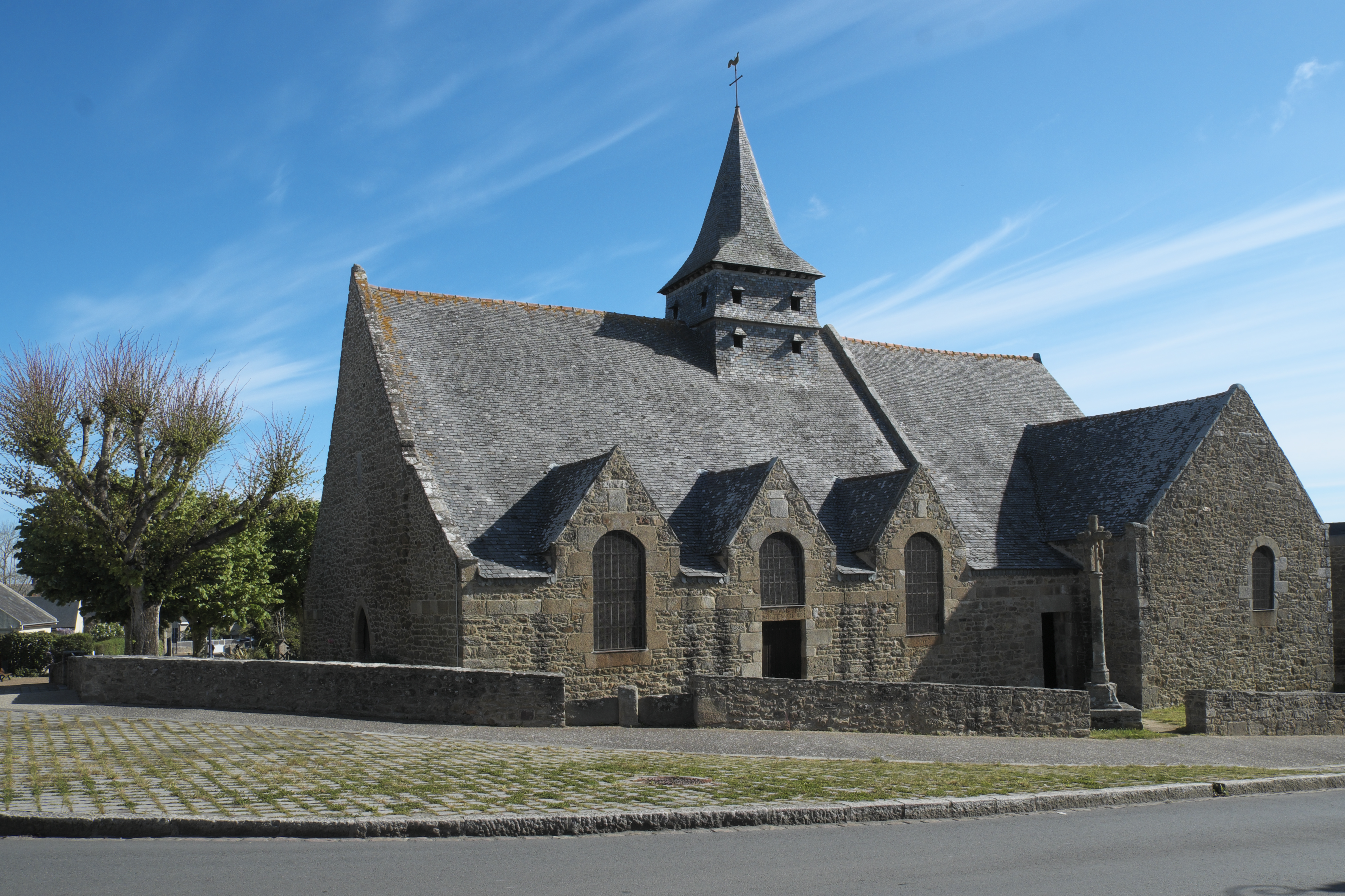 Alte Katholische Pfarrkirche Saint-Lunaire in Saint-Lunaire im Département Ille-et-Vilaine (Region Bretagne/Frankreich)